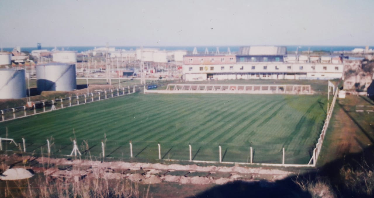 Csncha de aldodivi